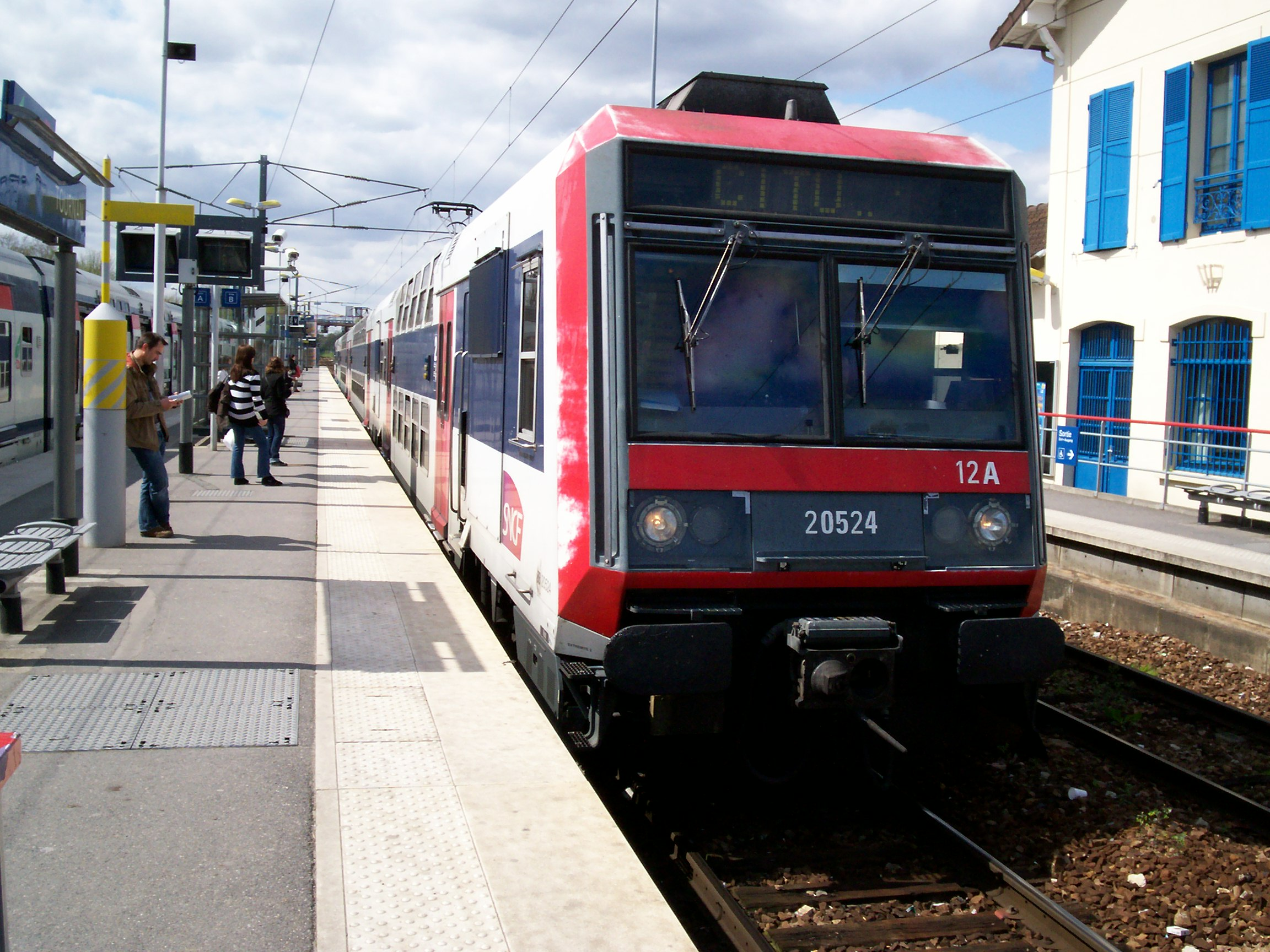 Train CITU en gare origine de Tournan